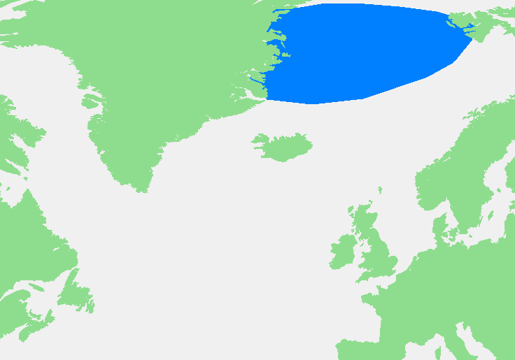 Groenlandzee.PNG